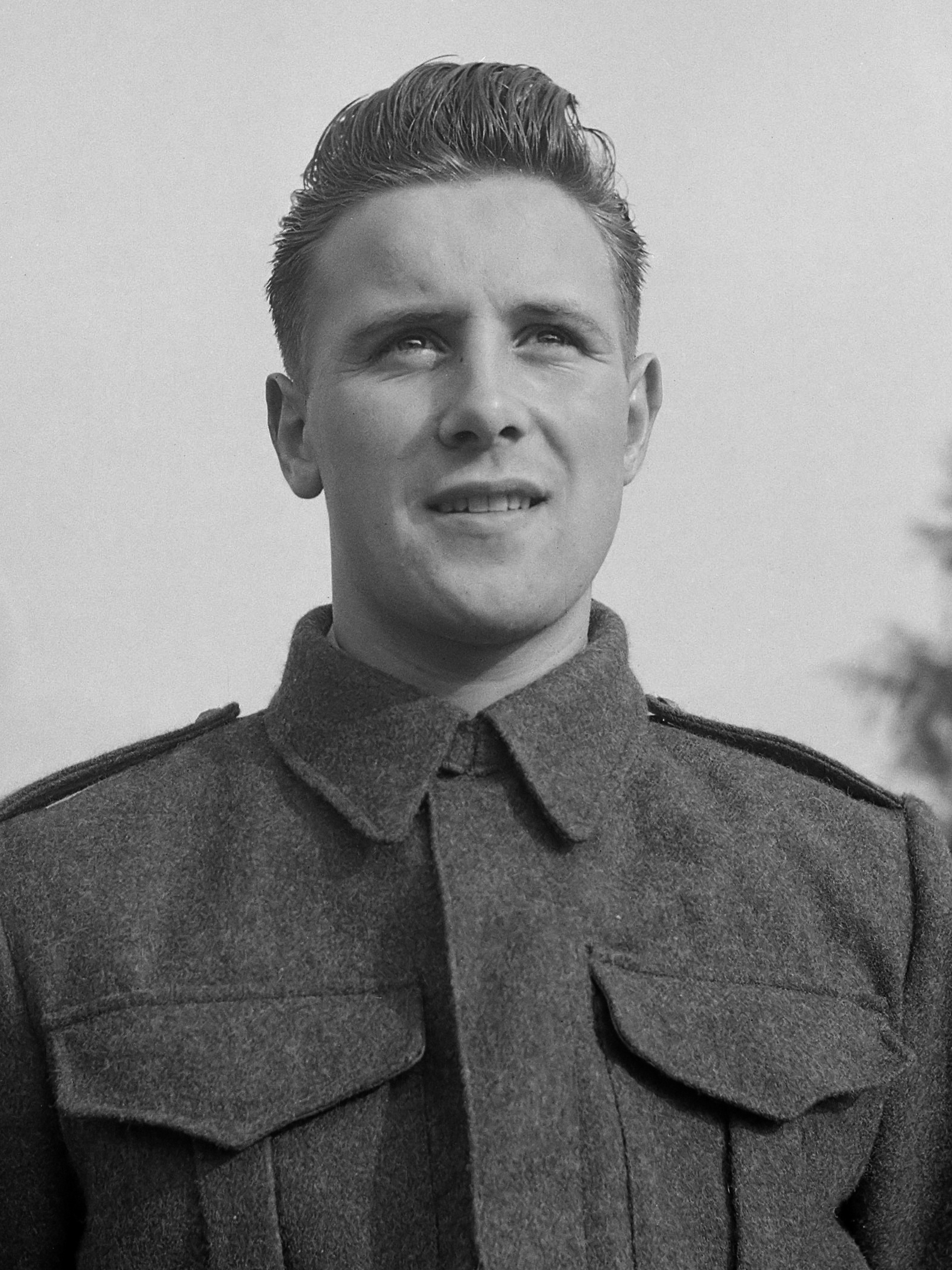 Debutant Nederlands elftal Bosselaar (Feyenoord) 11 oktober 1955